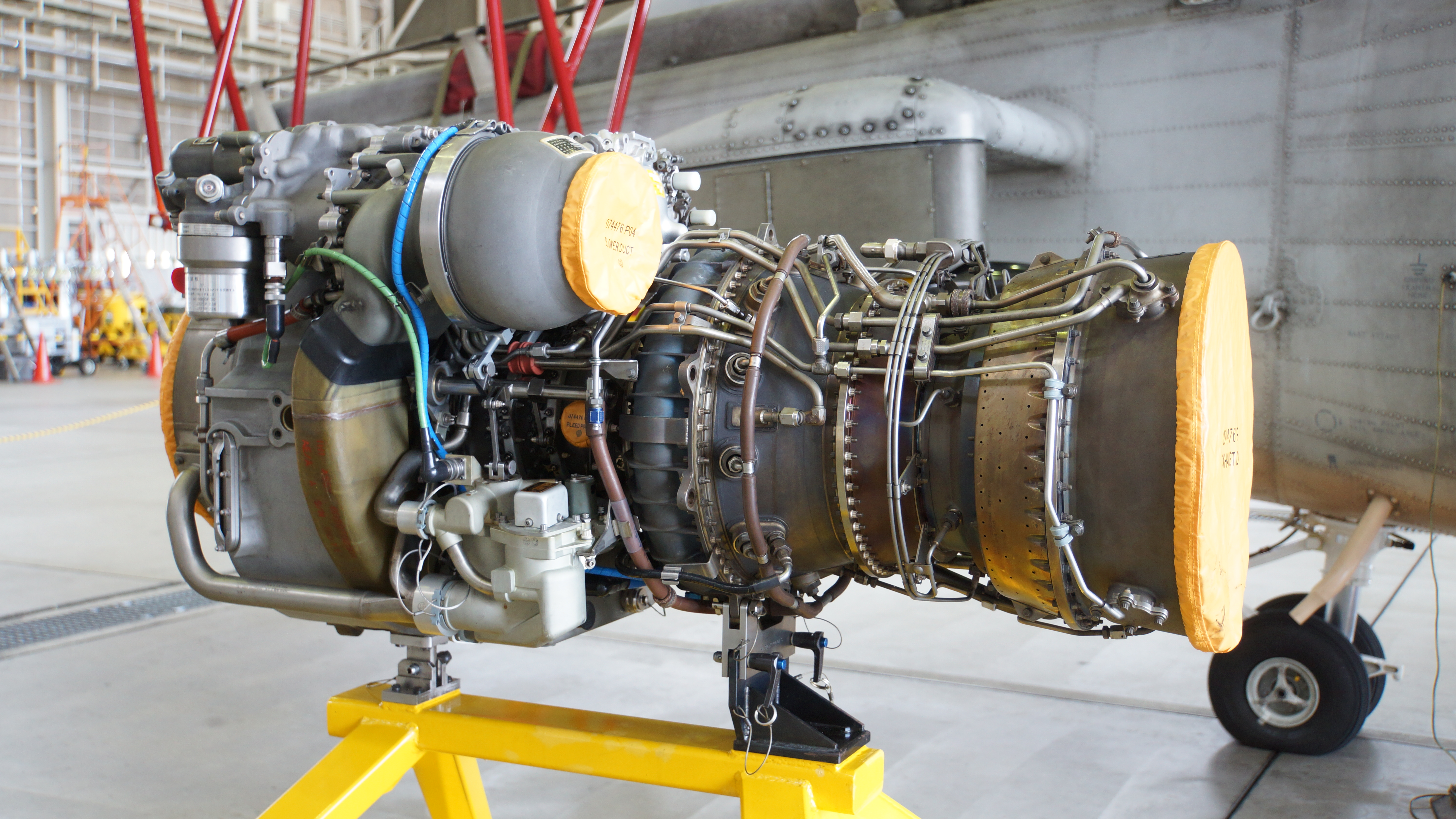 海上自衛隊 T700-IHI-401C2ターボシャフトエンジン（SH-60K哨戒ヘリコプター用） 左後部。2016年7月16日 舞鶴航空基地にて。